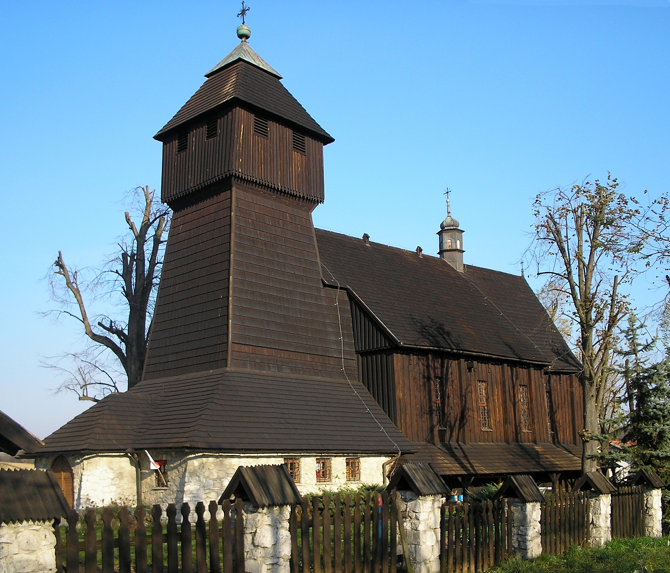 wieś Nowosielce